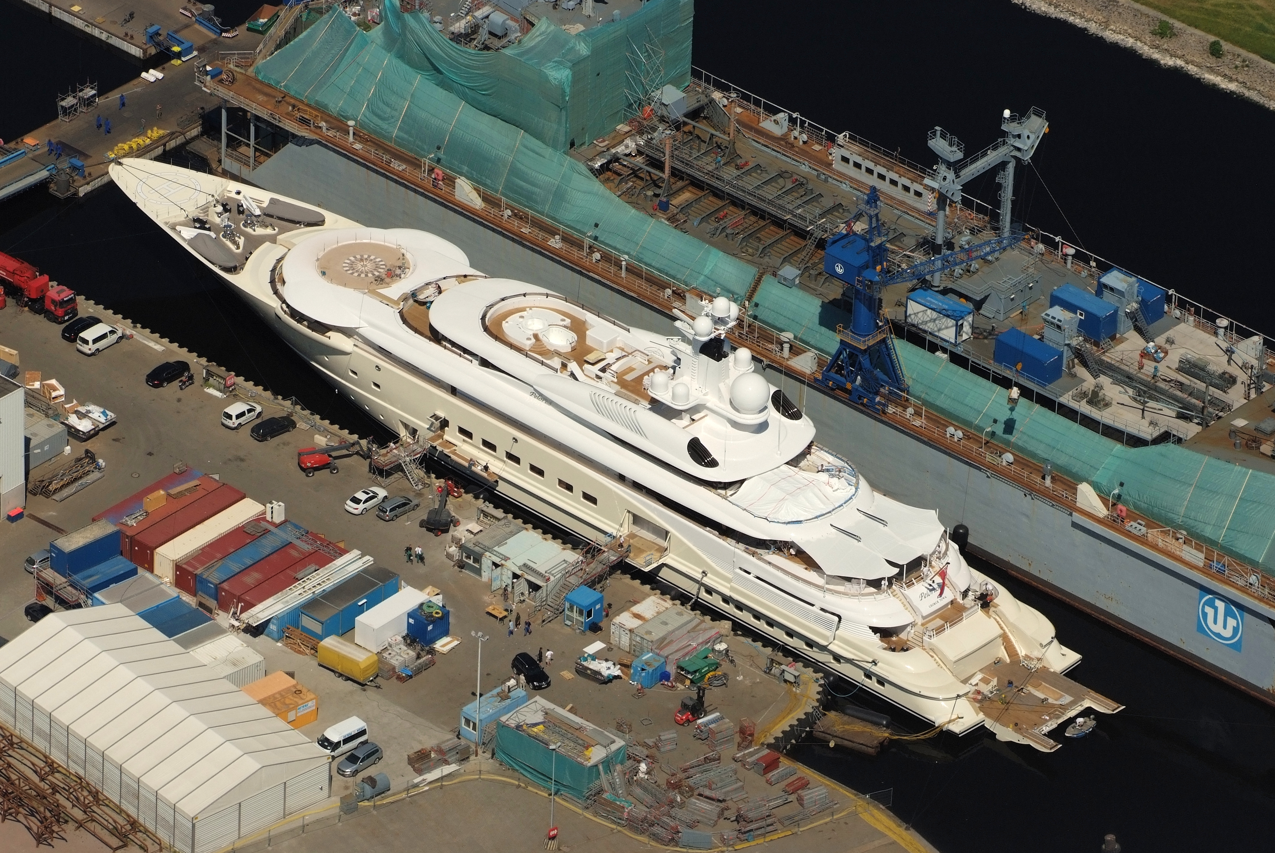 Fotoflug vom Flugplatz Nordholz-Spieka über Cuxhaven und Wilhelmshaven